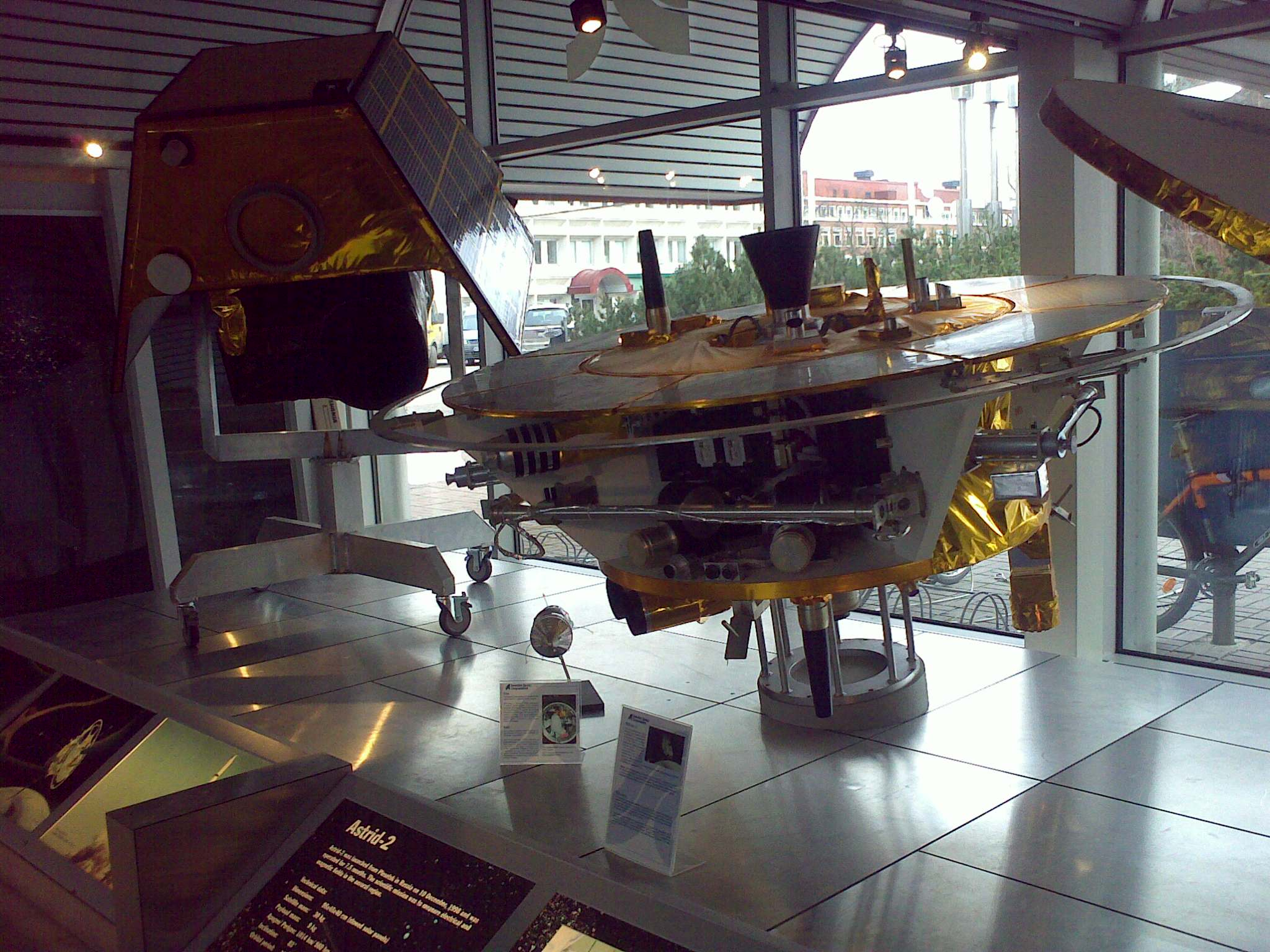 Satelliter i rymdstyrelsens lobby.